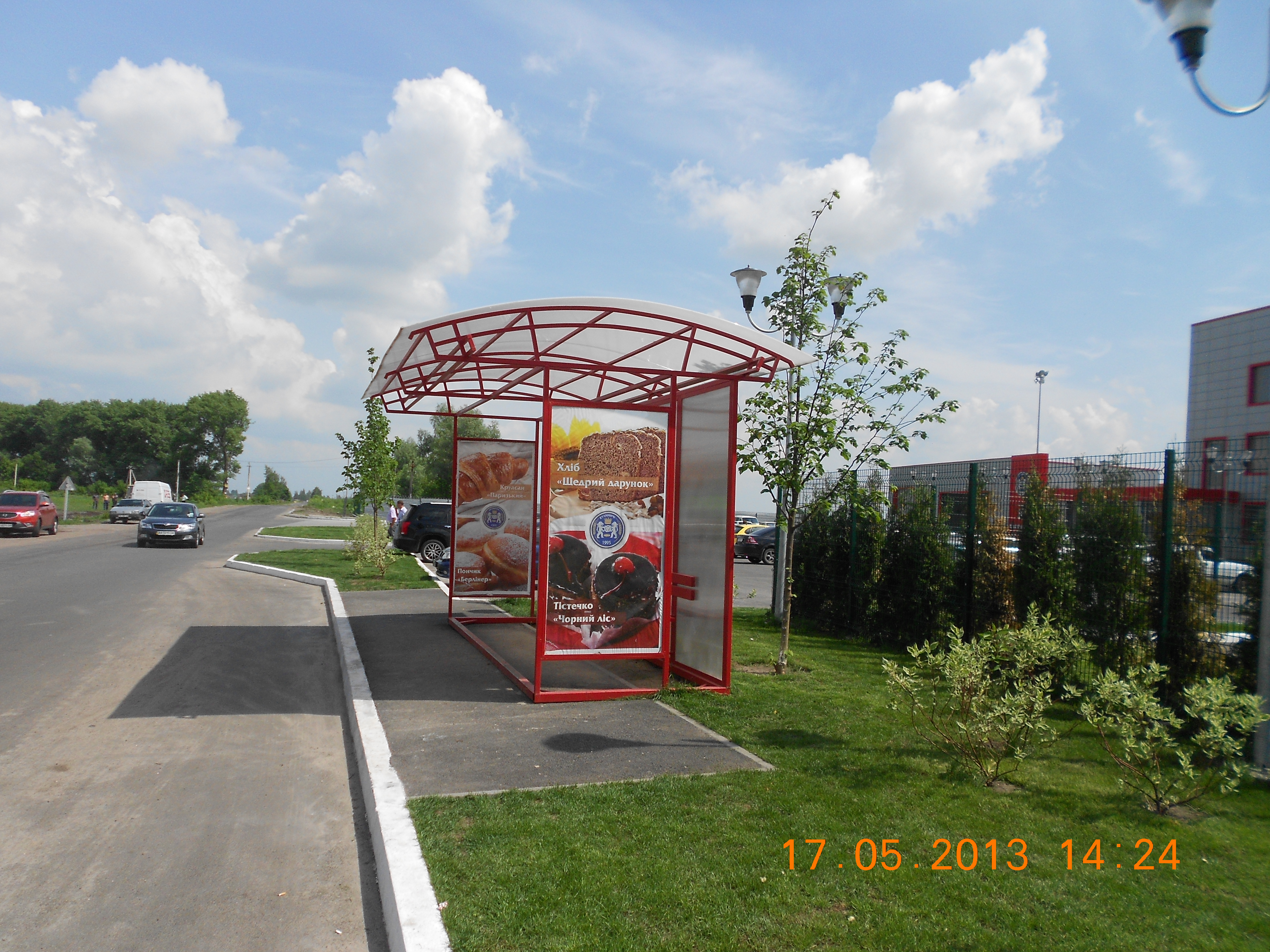 Krushynka17-05-2013Zupynka